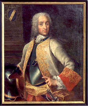 Anton Otto von Closs, General, Kurpfalz